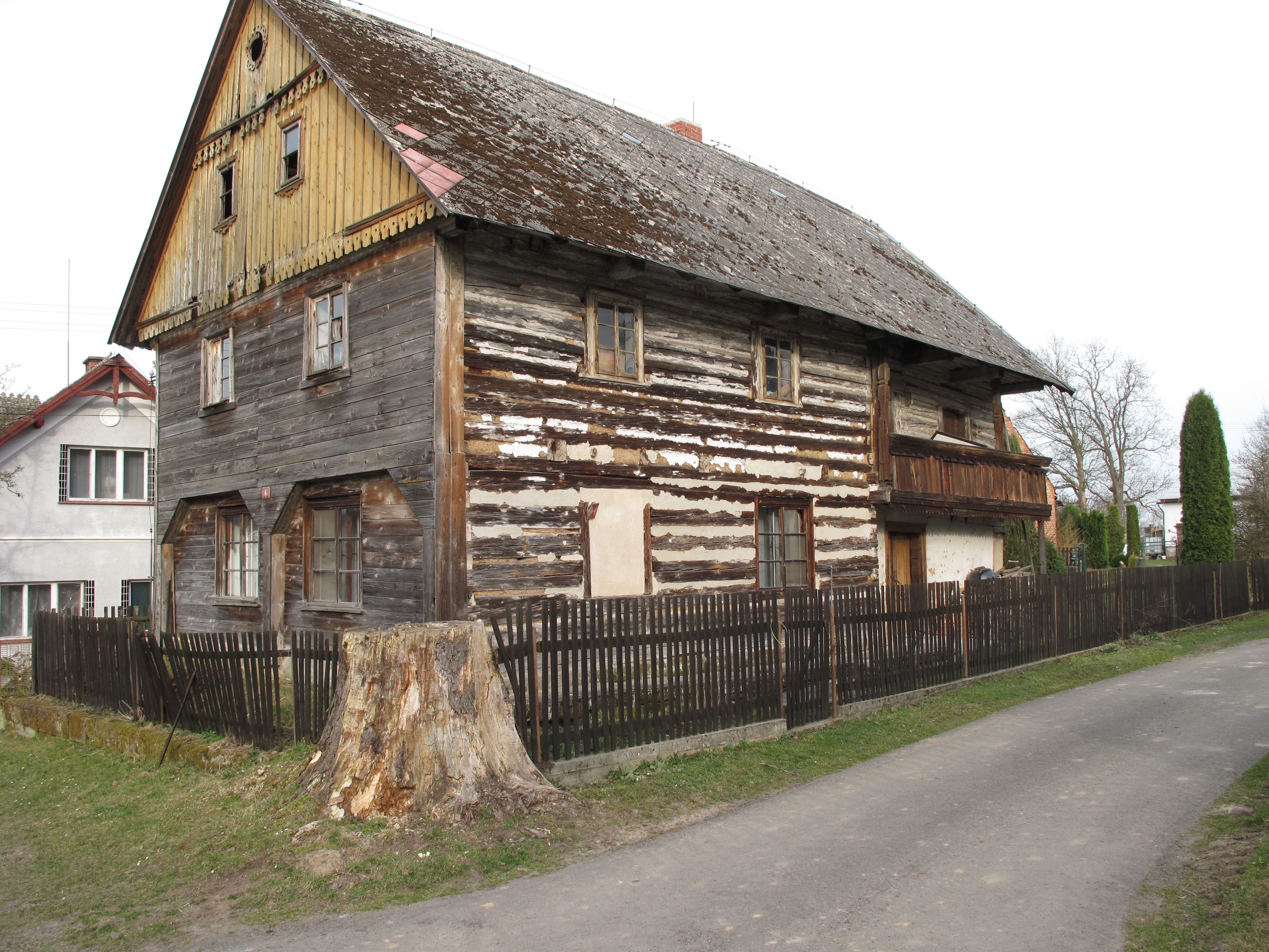 Roubenka v Sovenicích. Okres Mladá Boleslav, Česká republika.